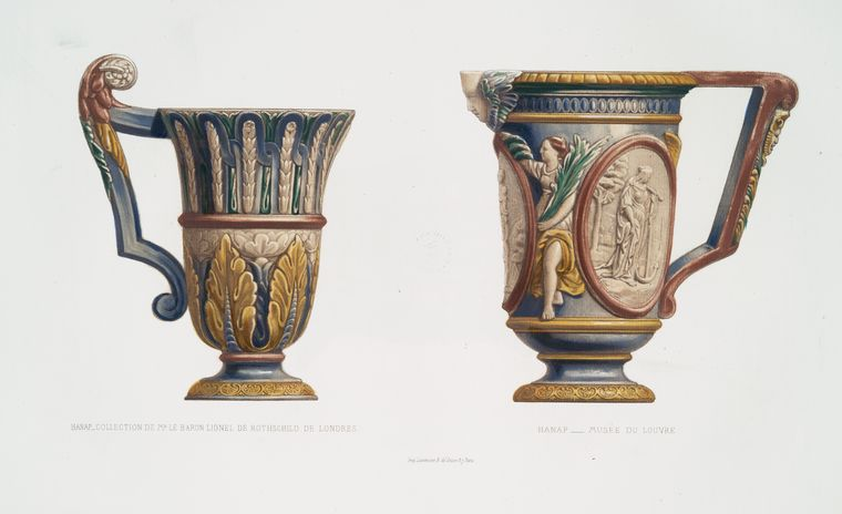 Hanap, collection de Mr. le baron Lionel de Rothschild de Londres ; Hanap, Musée du Louvre